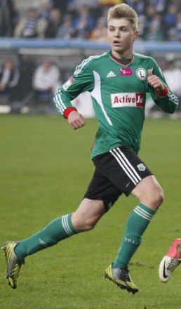 18.11.2012 307.jpg